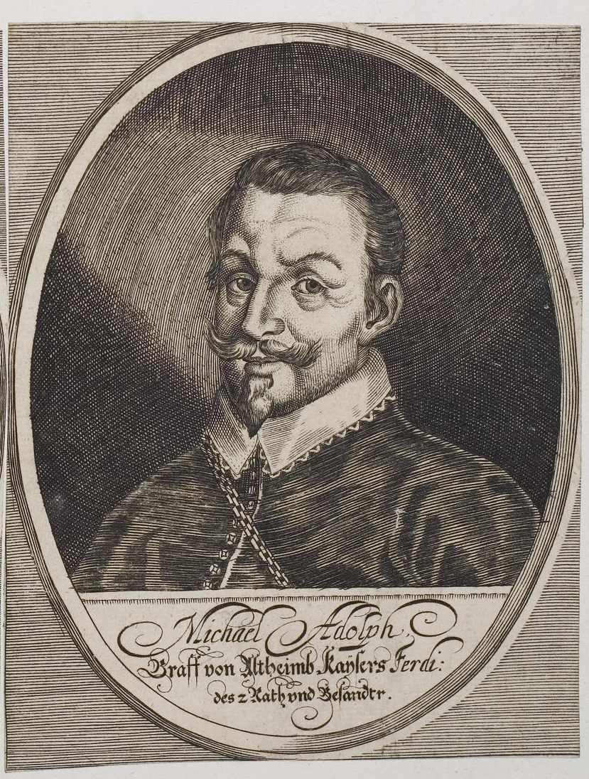 Grafik aus dem Klebeband Nr. 2 der Fürstlich Waldeckschen Hofbibliothek Arolsen Motiv: "Michael Adolph Graff von Altheimb" (Michael Adolf Graf von Althann)